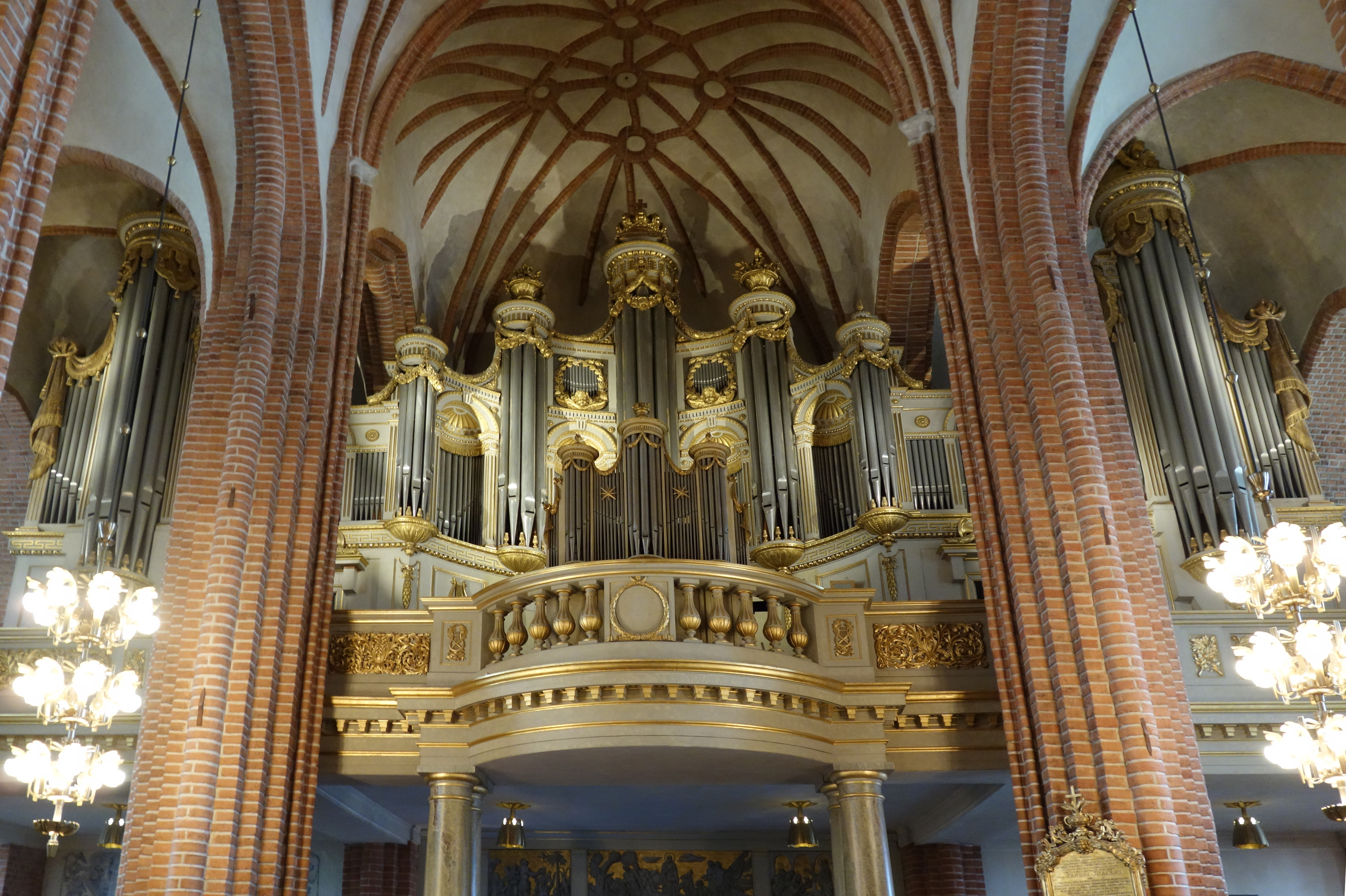 Orgel der Storkyrkan in Stockholm (1960, Marcussen & Søn, IV/53)